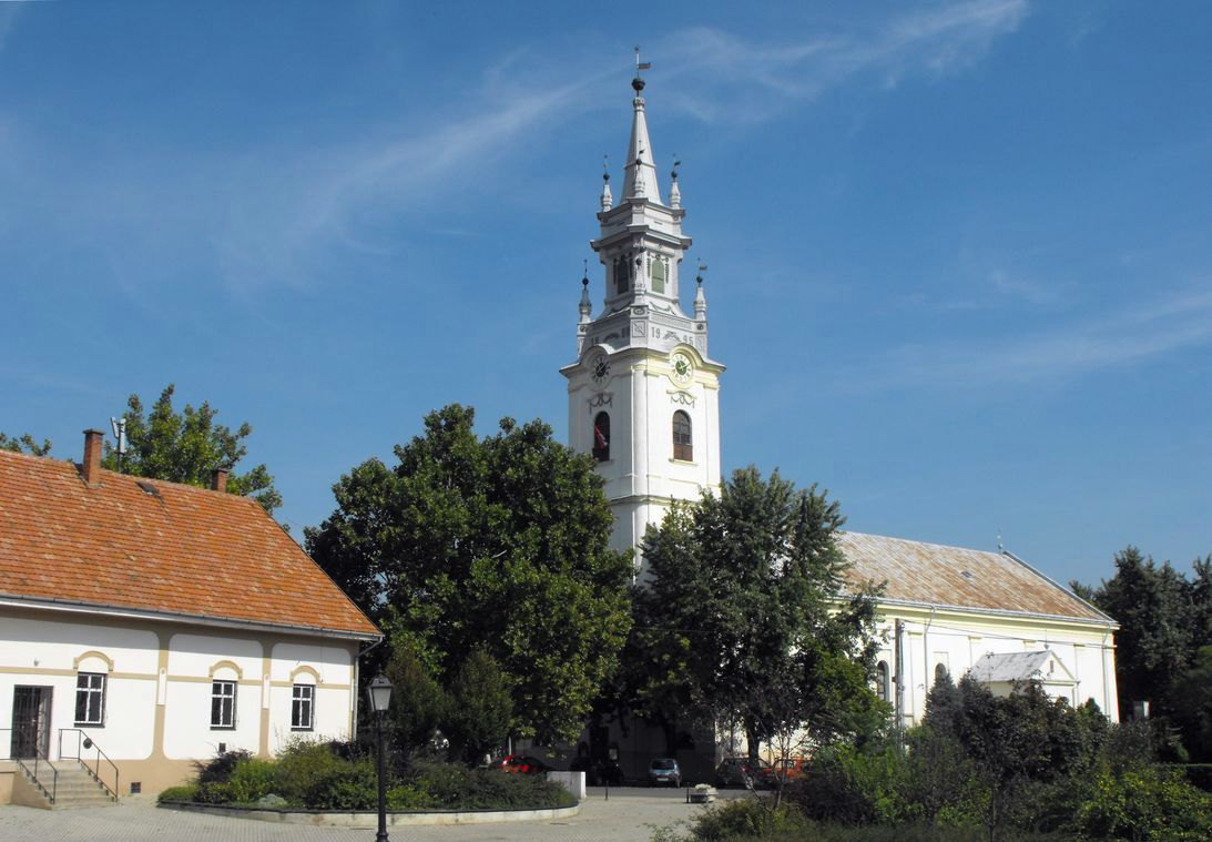 Európában egyedül álló kilenc ágú templom torony.